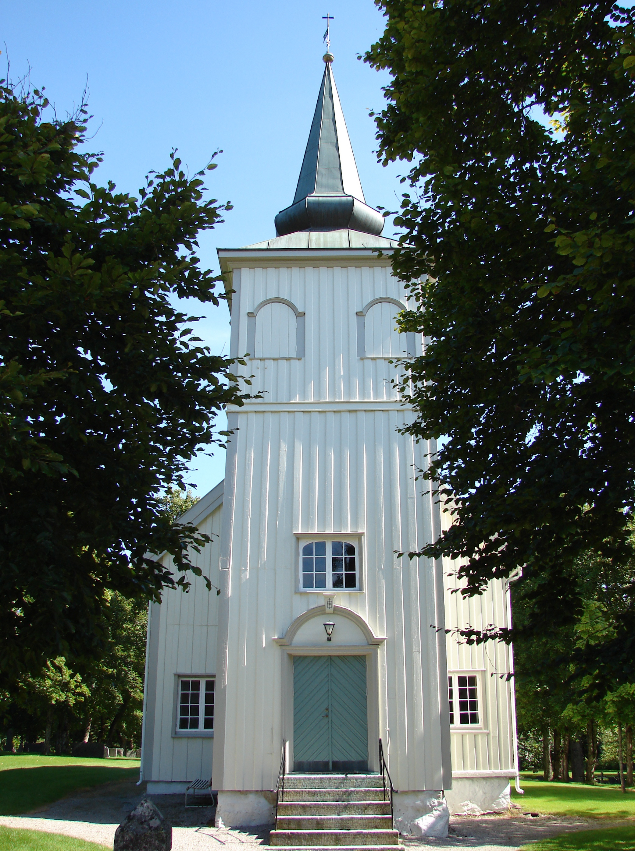 Solum Kirke, Telemark